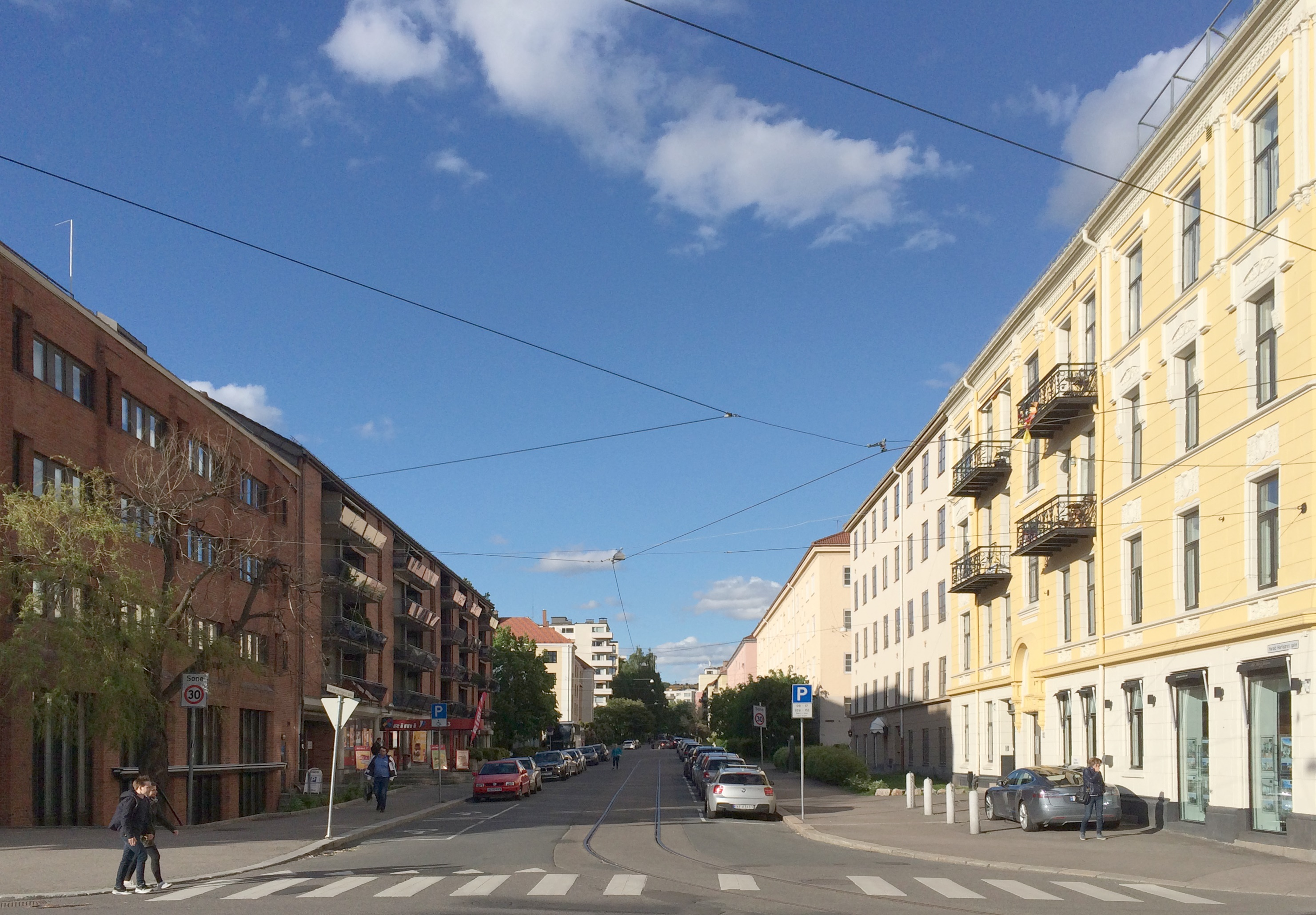 Harald Hårfagres gate